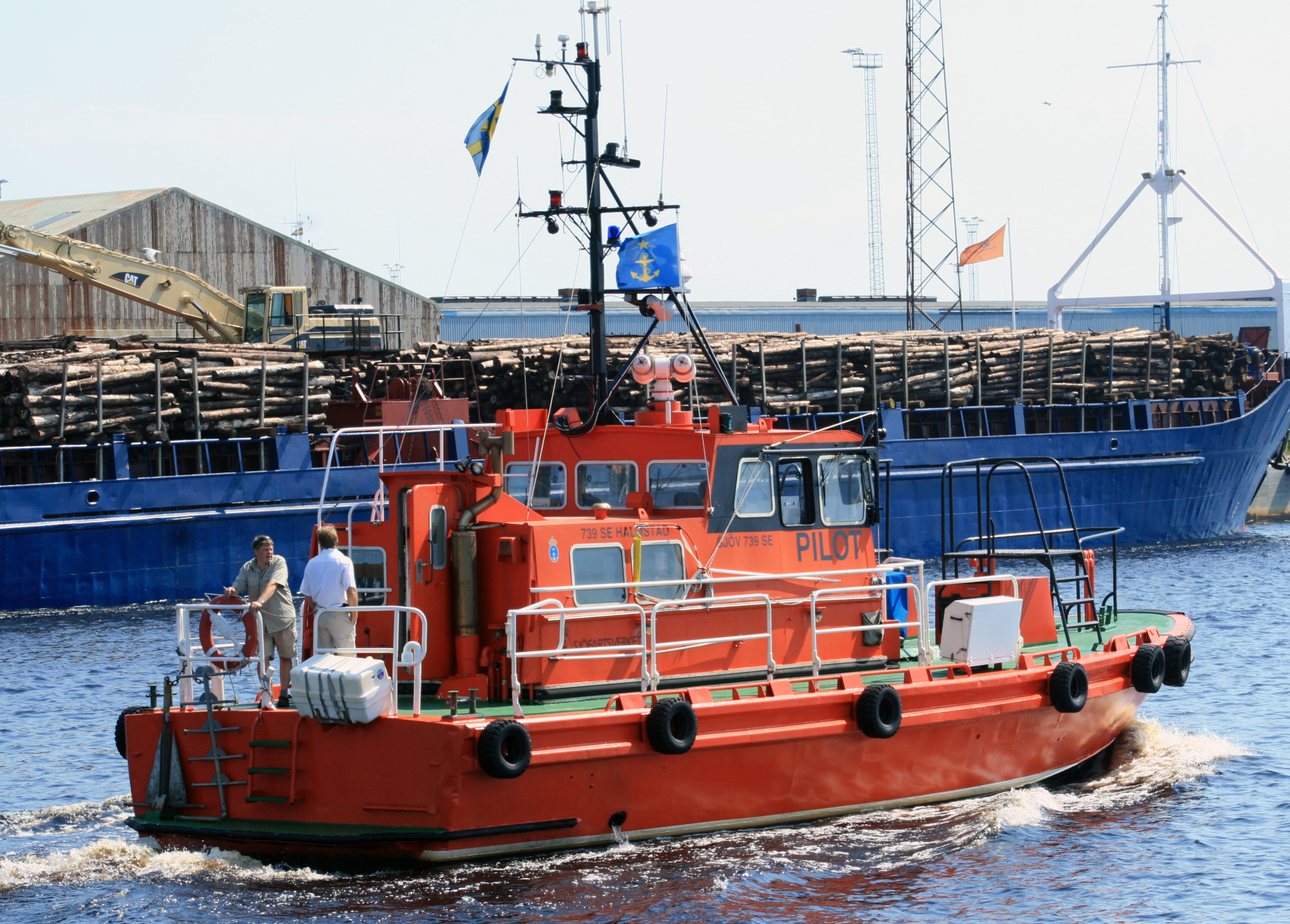 Pilot 739 SE i Halmstad 2 juli 2009